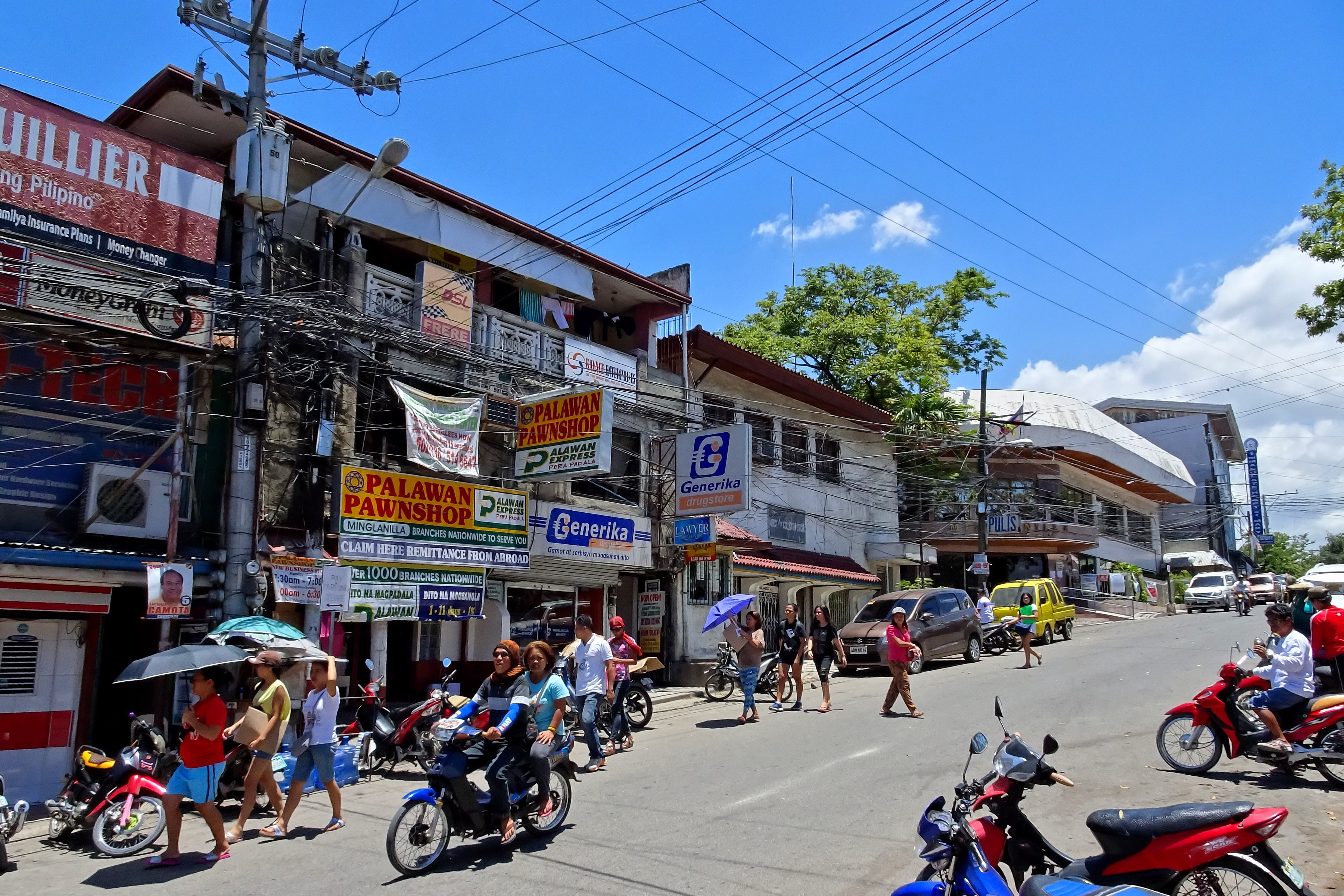 Minglanilla, Cebu, Philippines